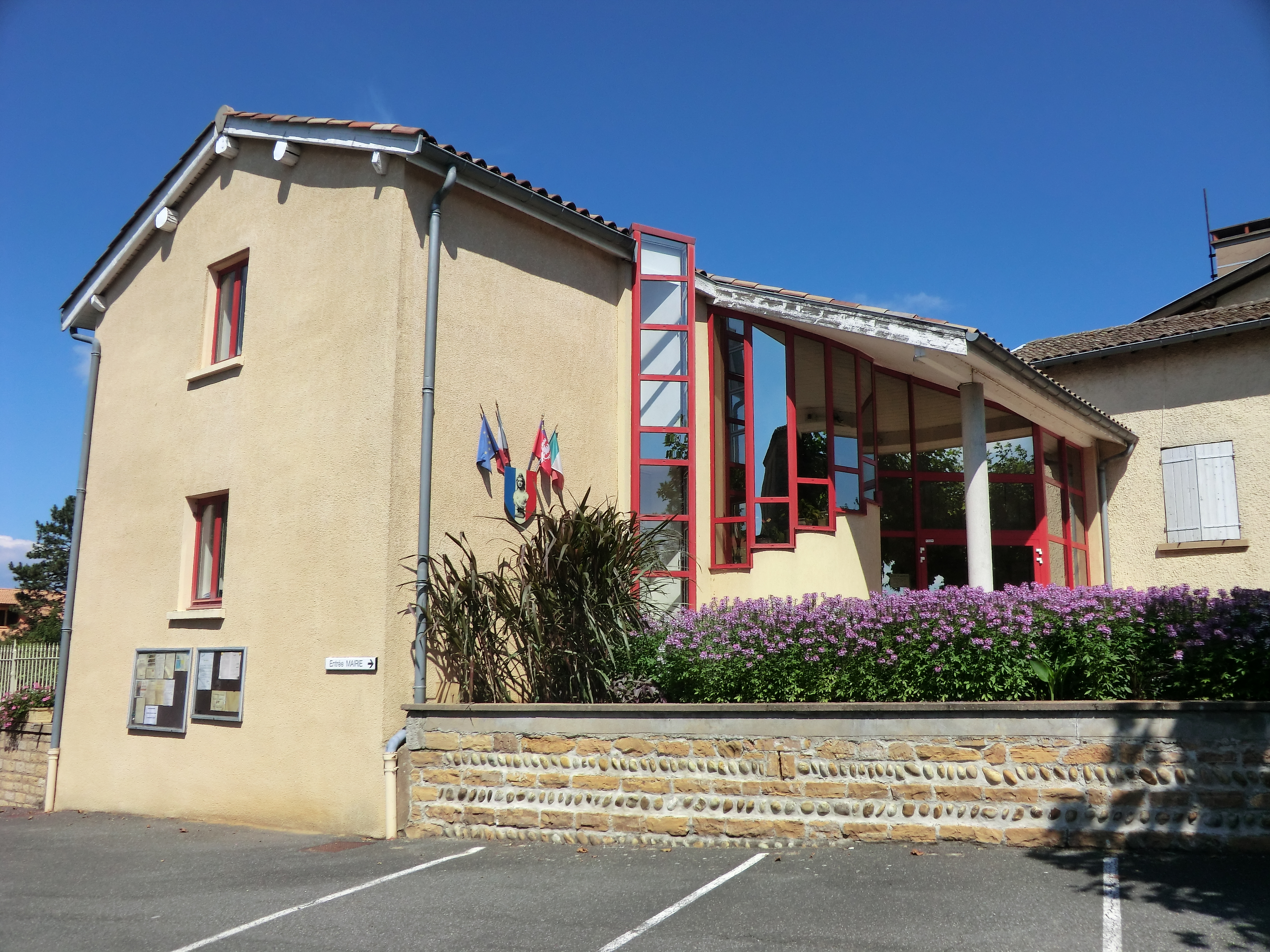 Mairie de Massieux.